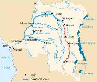 congo river